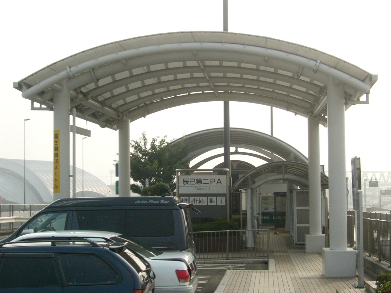 Tatsumi 2 Parking Area